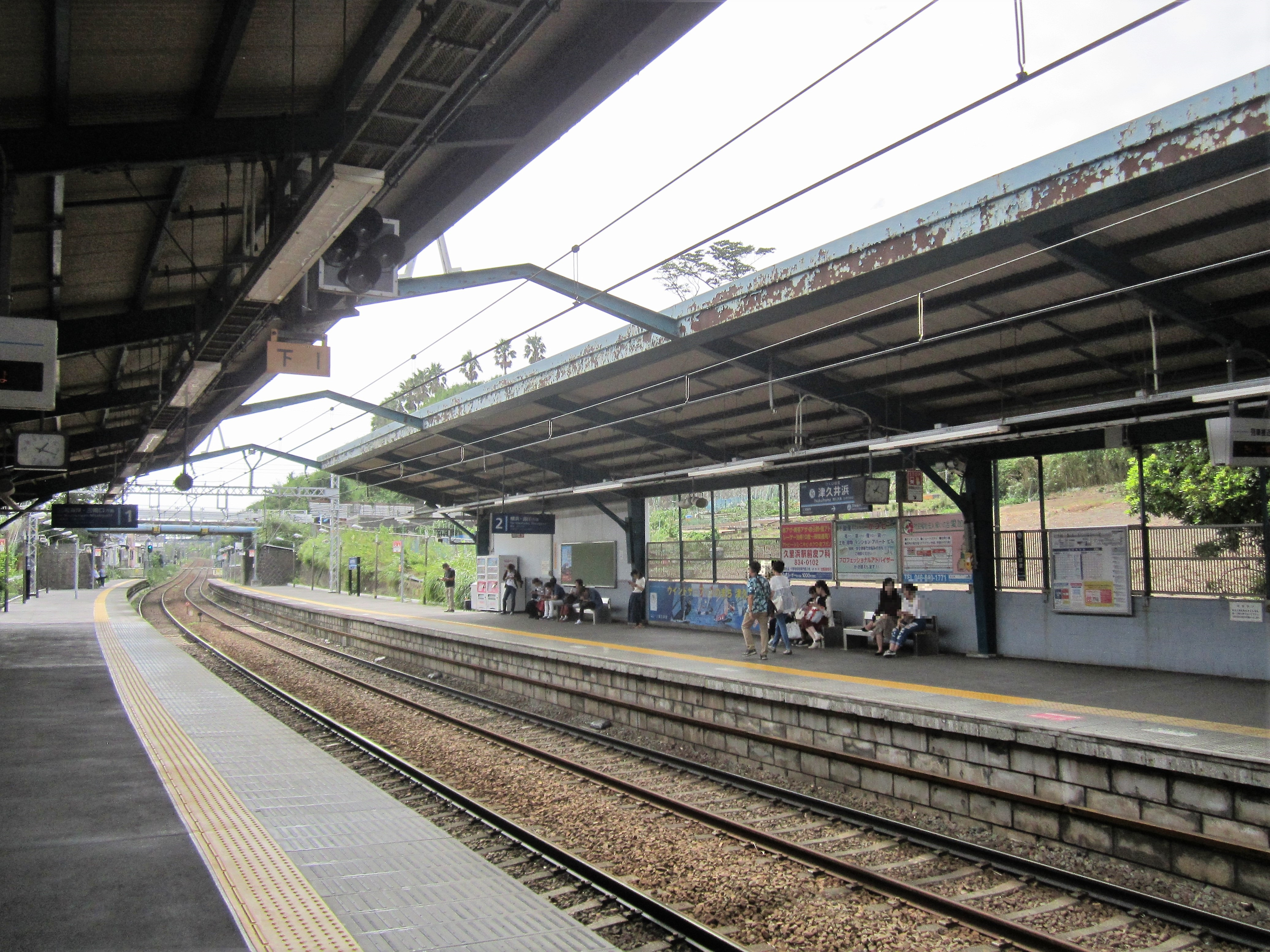 津久井浜駅ホーム